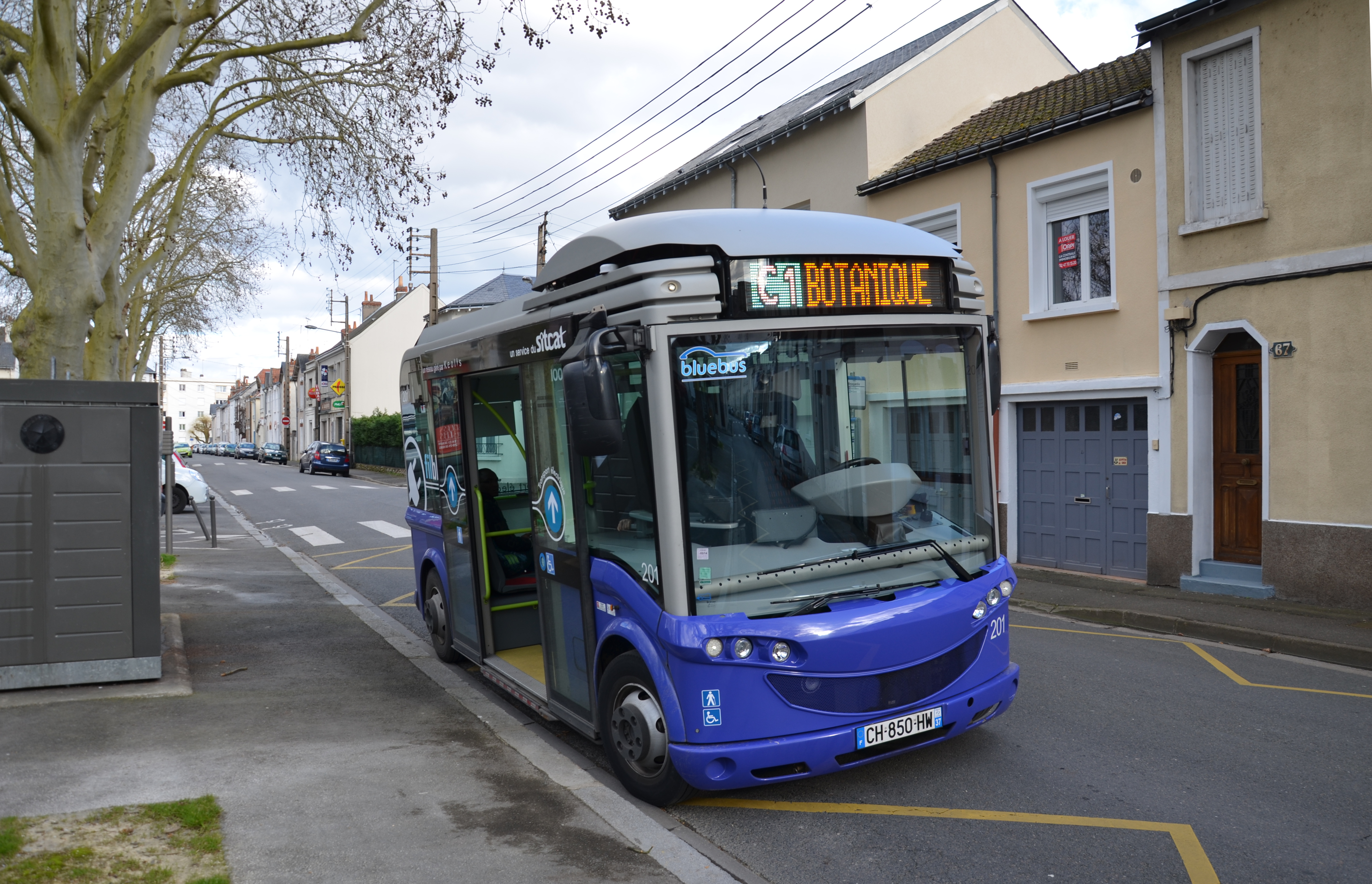 Gruau BlueBus n°201 du réseau Fil Bleu sur la ligne C1 à Beaujardin.